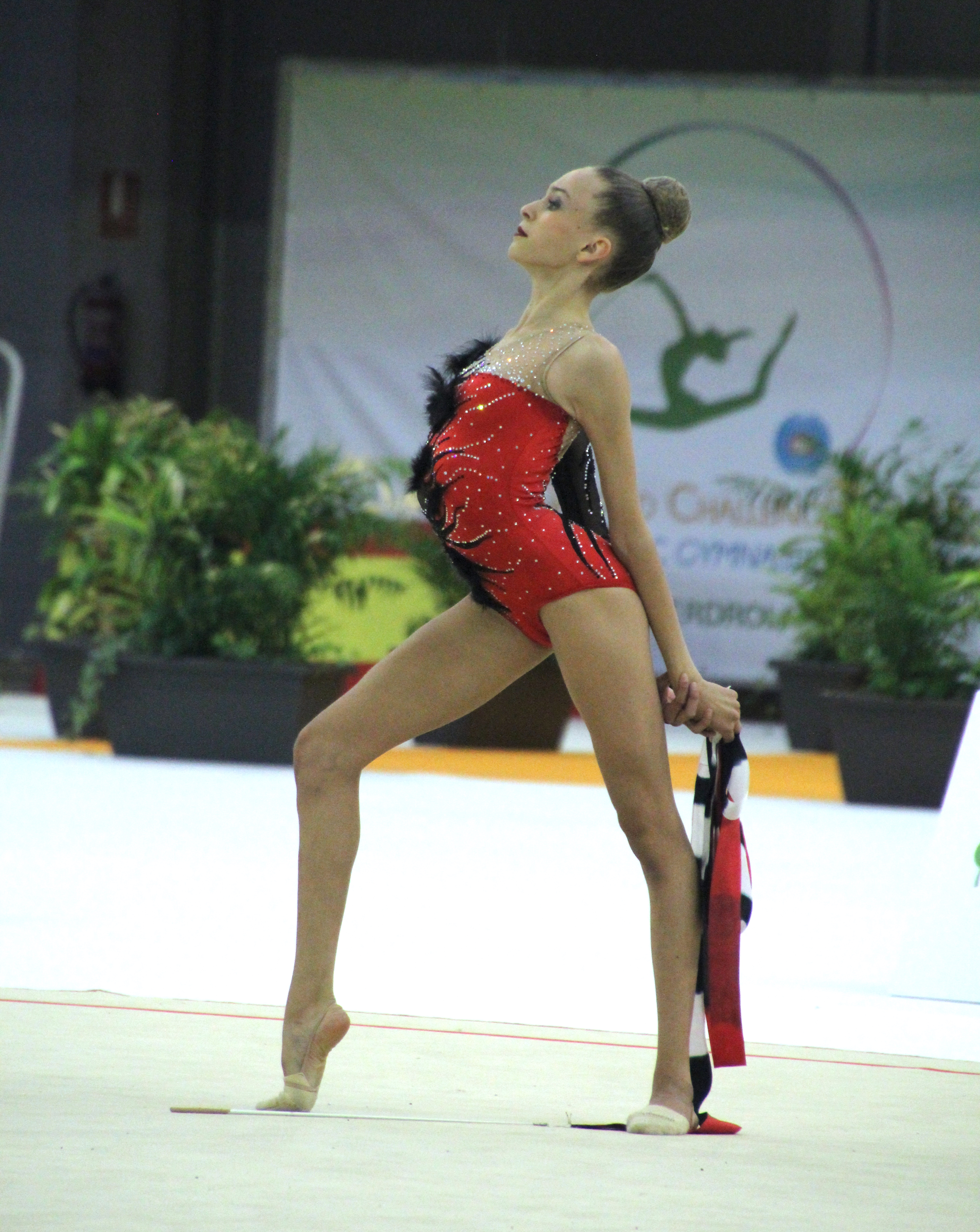 La gimnasta Nerea Moreno durante el ejercicio de cinta en el Campeonato de España Individual en Guadalajara en junio de 2018.